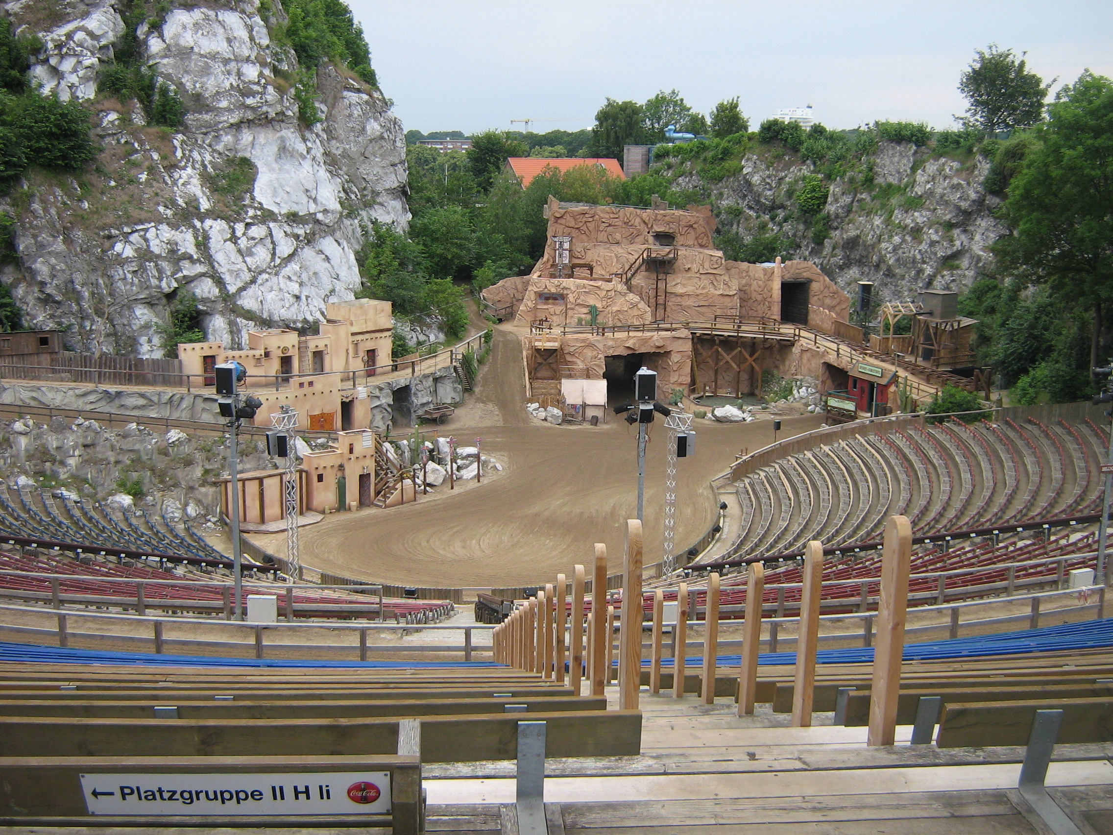 Die Bad Segeberger Kalkbergarena.